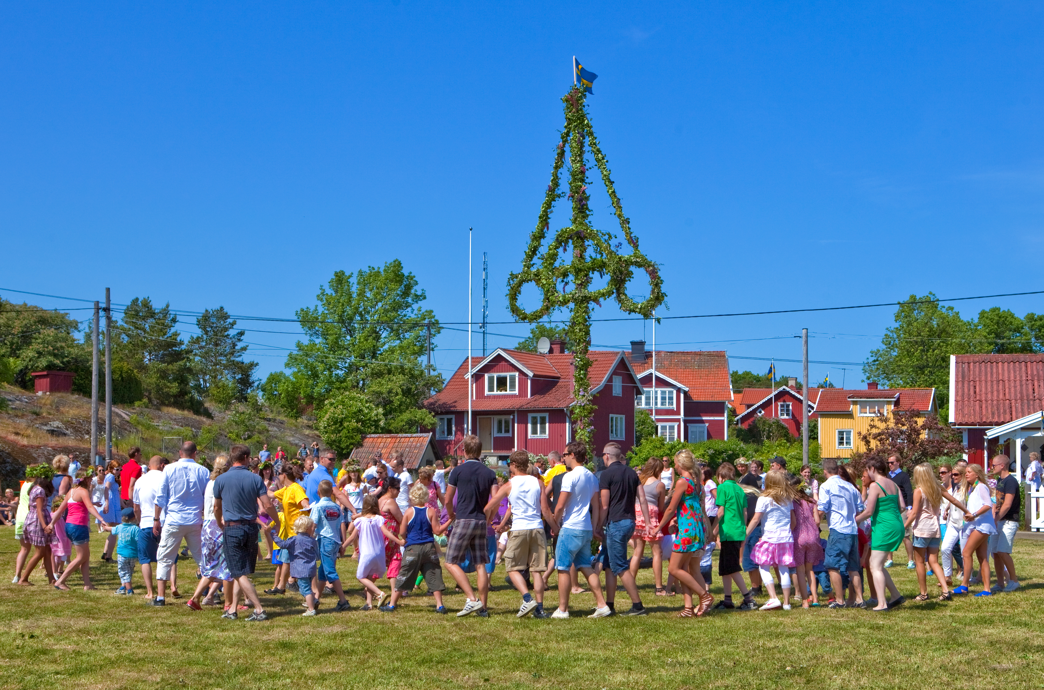 Midsummer Möja 2010